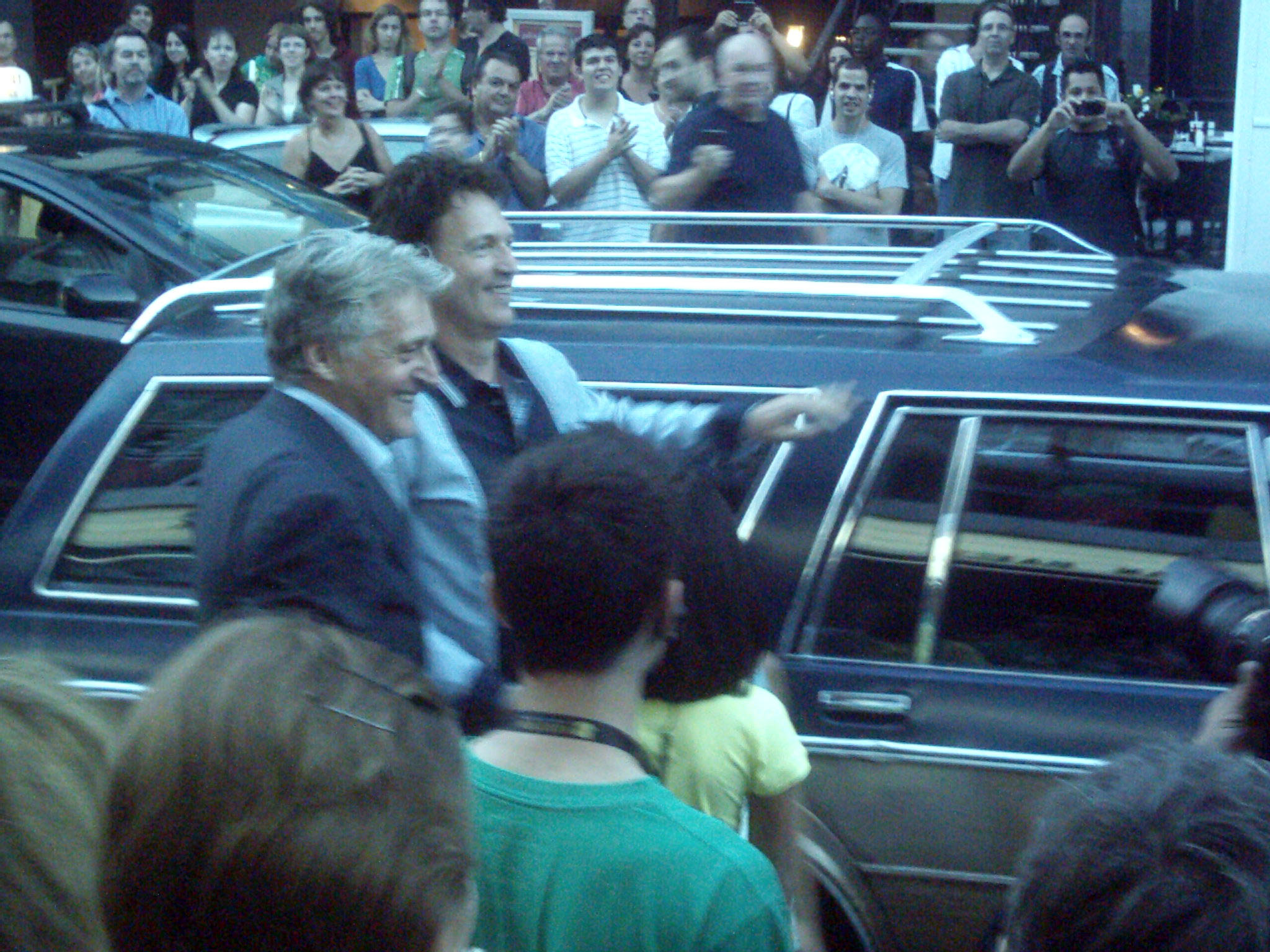 Gilbert Rozon et Claude Meunier arrivant au théâtre Saint-Denis un soir de Gala Juste pour rire en l'honneur de Claude Meunier